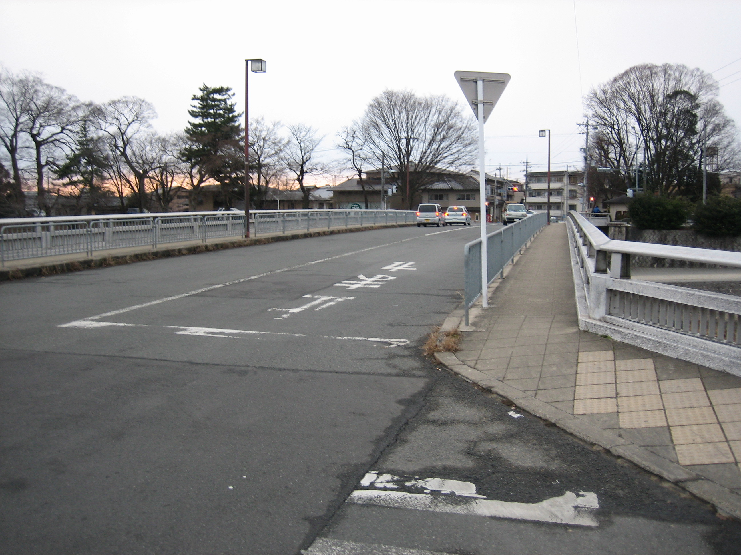 上賀茂橋を橋東詰橋上から撮影